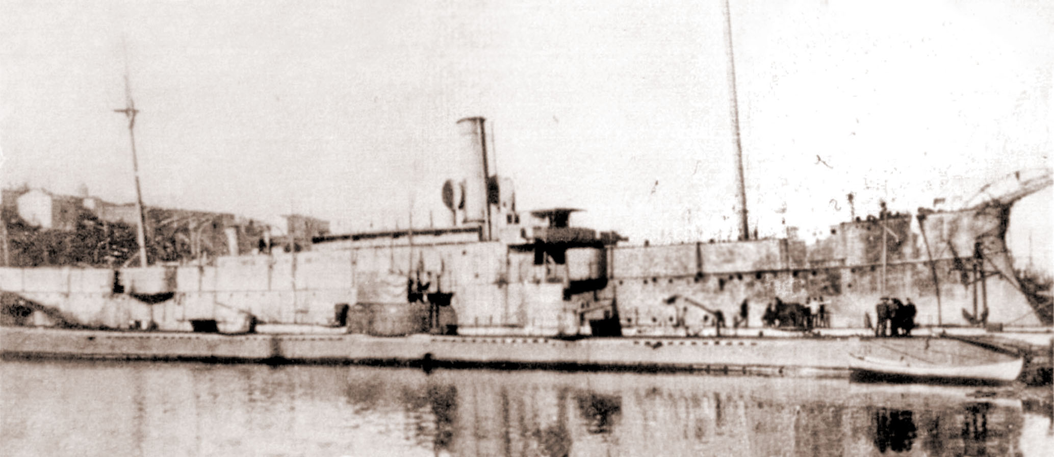 ПЛ "Утка" у борта Блокшива №9 в составе морских сил Юга России, Севастополь 1919 год